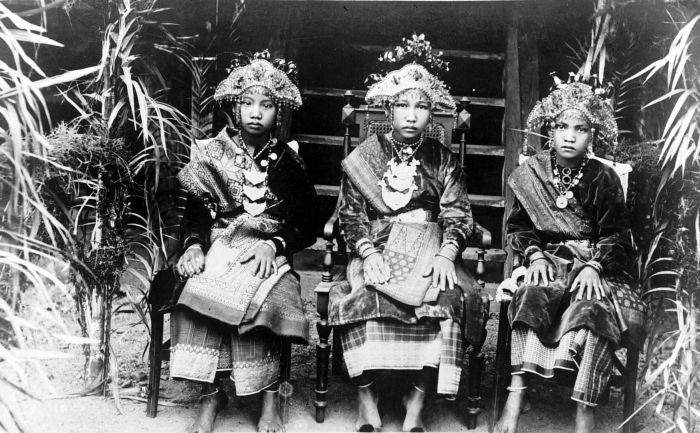 Repronegatief. Drie ongehuwde jonge vrouwen uit Komering